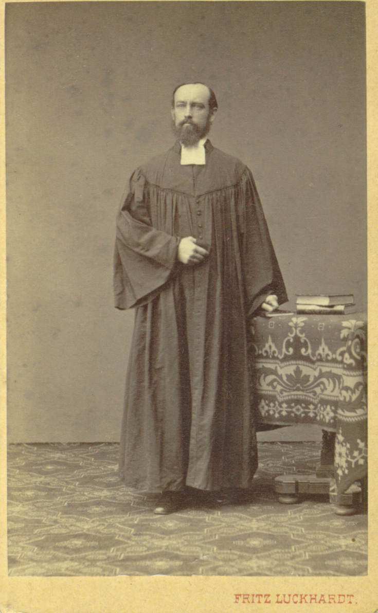 Der Wiener Oberkirchenrat Hermann von Tardy